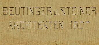 Ausschnitt aus File:Hn-wilhelmstr17-datierung.jpg